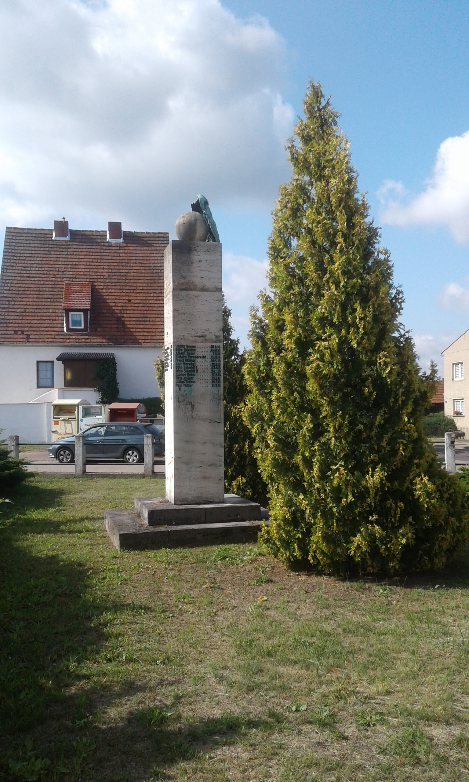 Kriegerdenkmal